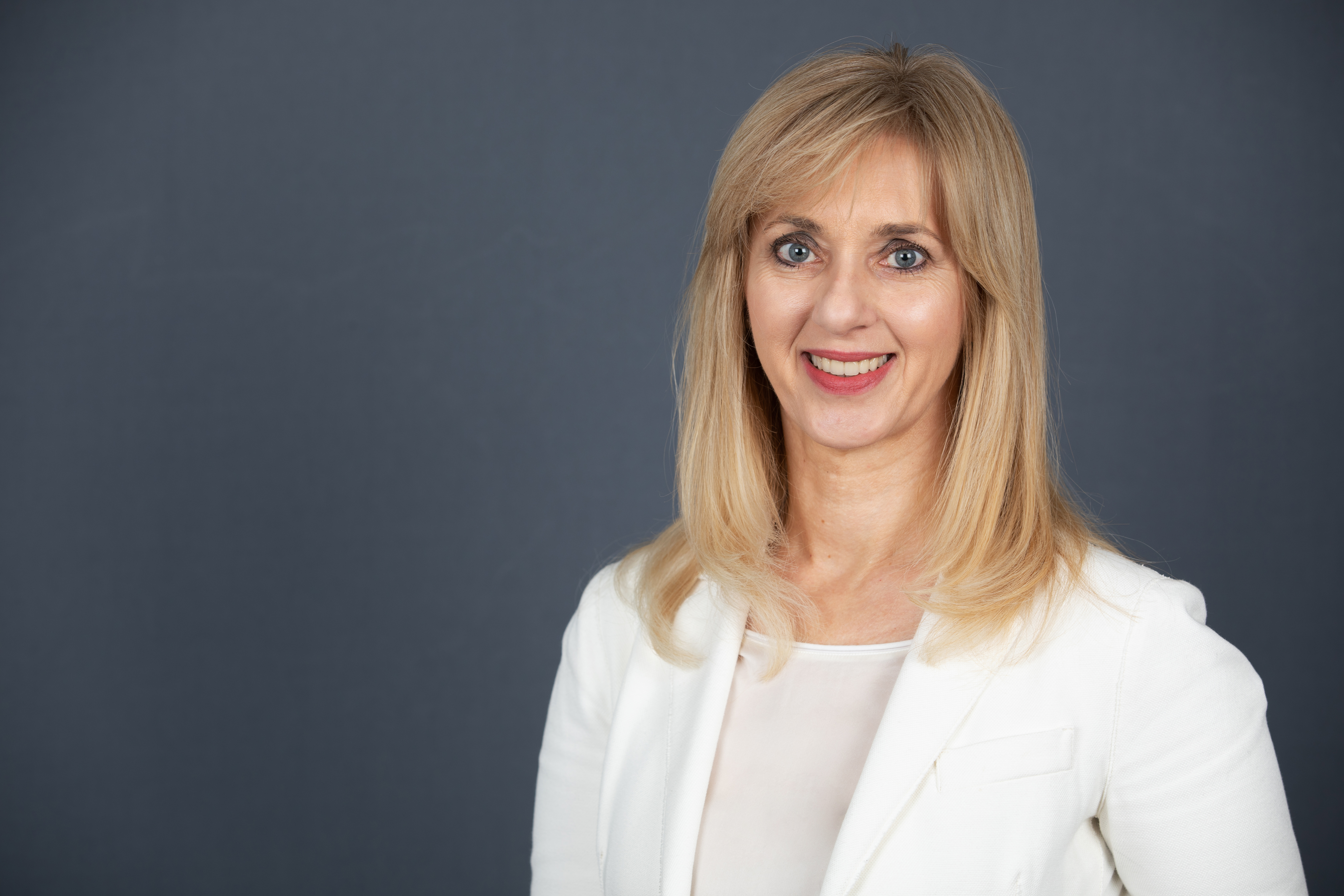 Renata Alt (FDP)